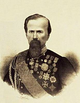 Paolo Calvi, "Ritratto di Enrico Cialdini", ridotto e ritoccato, litografia